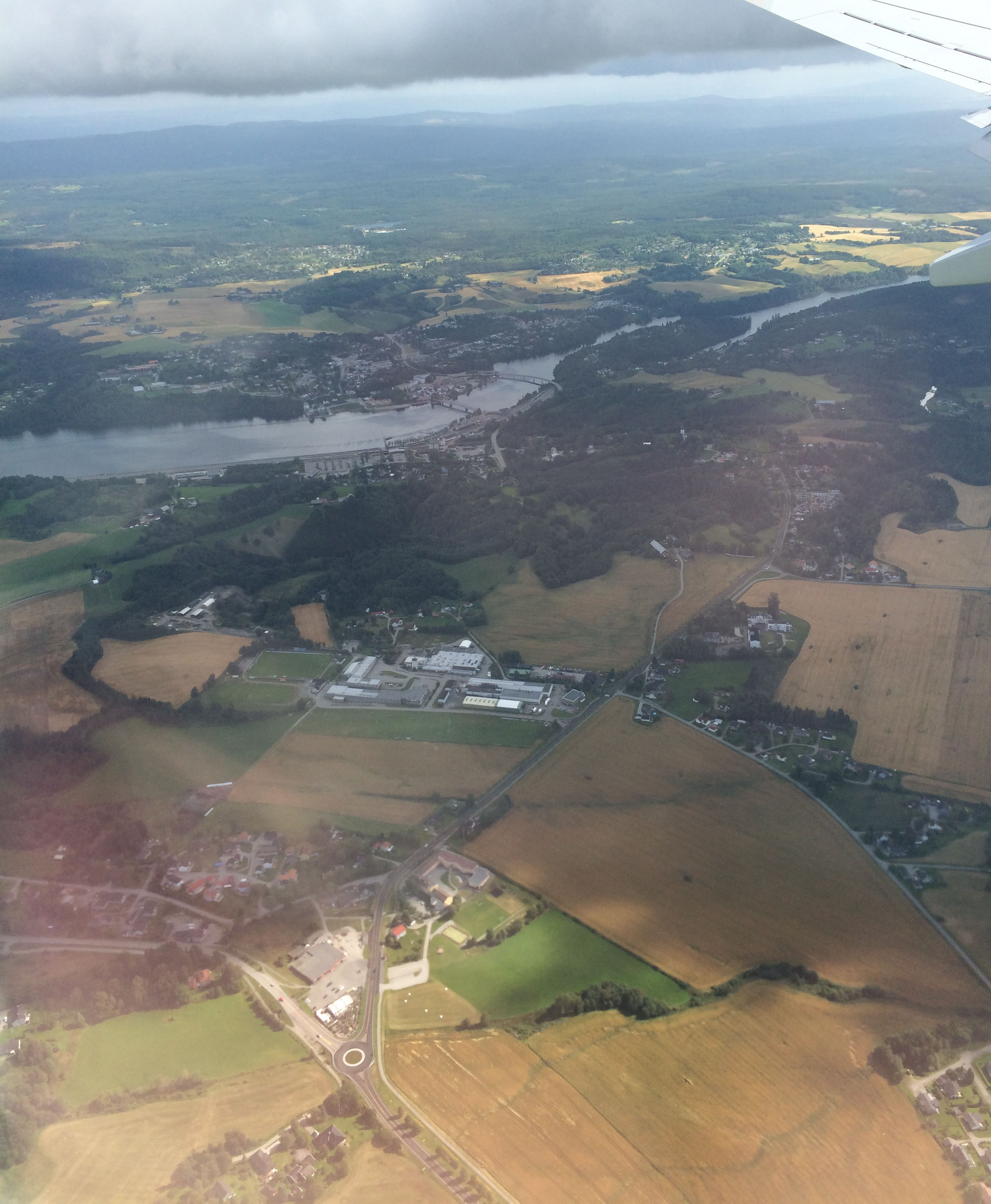 Eidsvoll sett ovenifra. Bildet er tatt fra et fly.